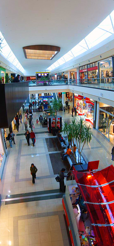 Panorámica interior de la ampliación del Mall Arauco Maipú, en Santiago de Chile, terminada a fines de 2007. Softwares usados: Autostich y Photoshop. Imagen tomada el domingo 27 de abril de 2008.